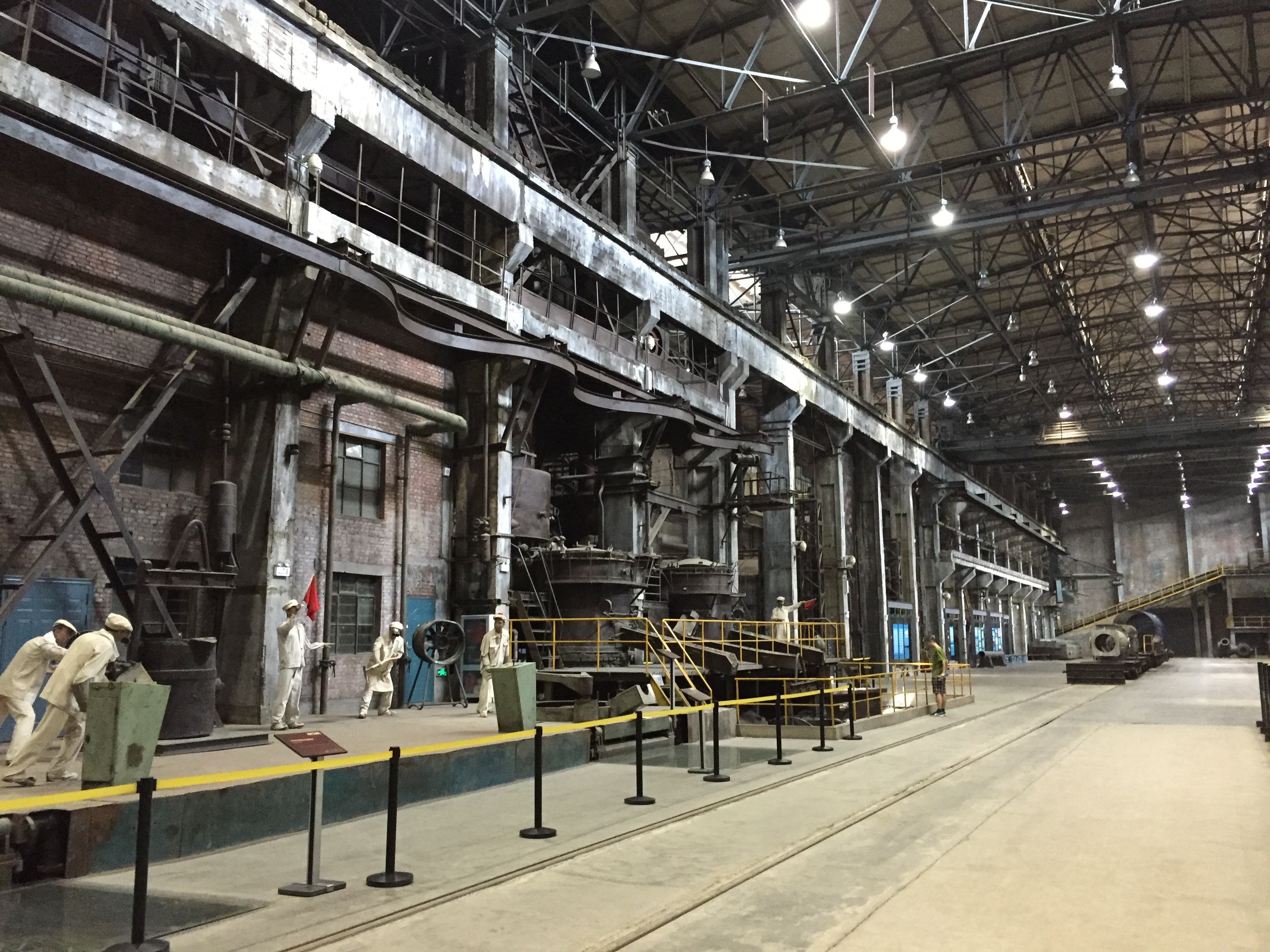 中文（中国大陆）: 中国工业博物馆铸造馆